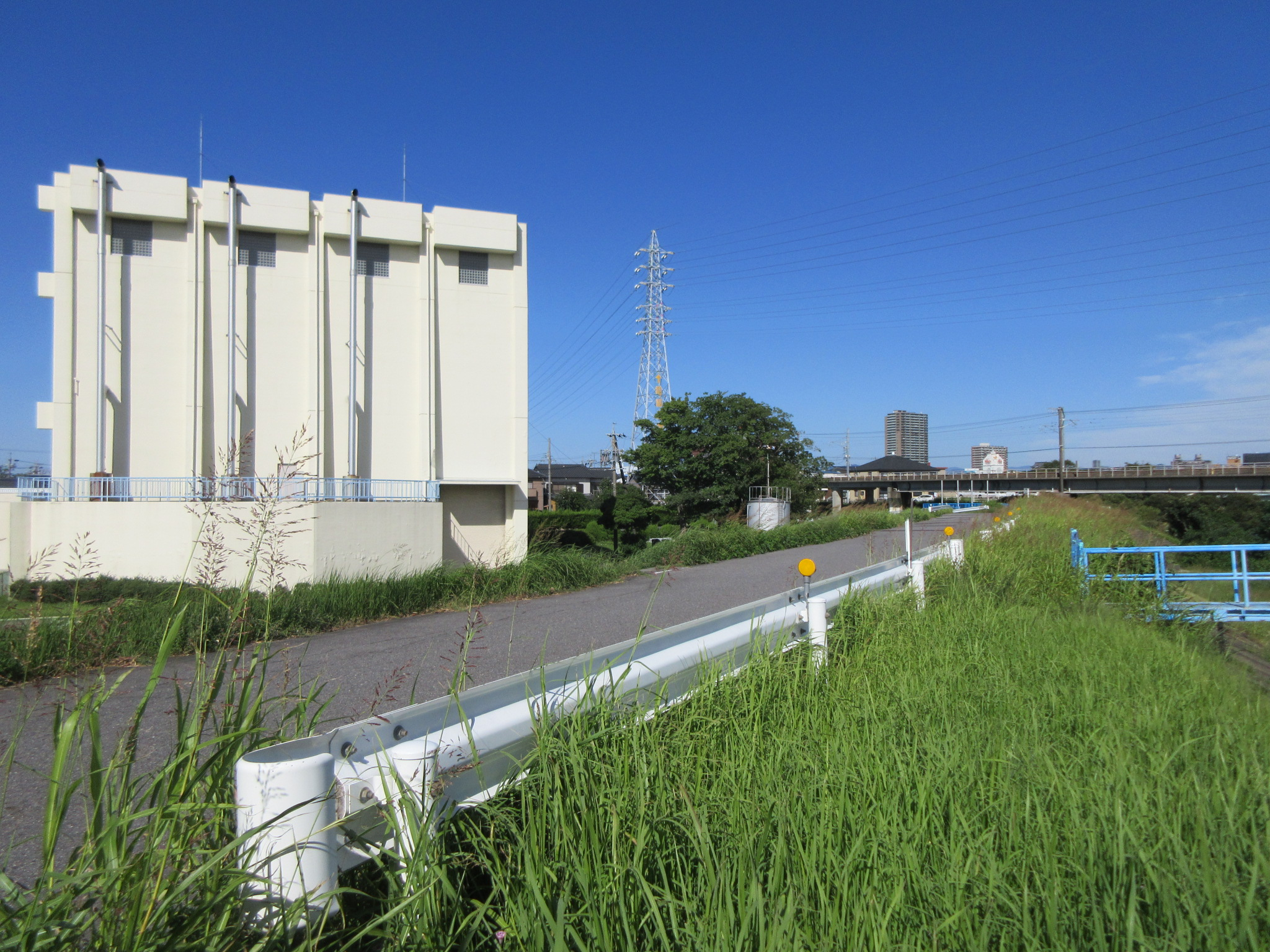 早川雨水ポンプ場（岡崎市八帖南町）